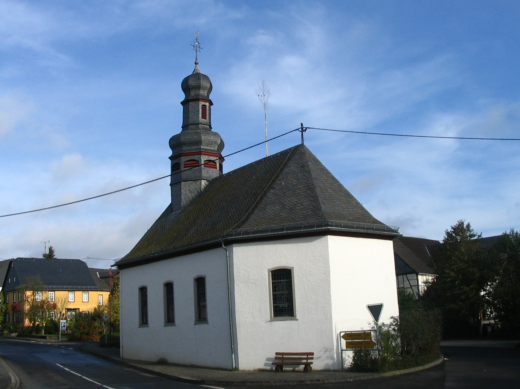 Dorfzentrum Pleizenhausen